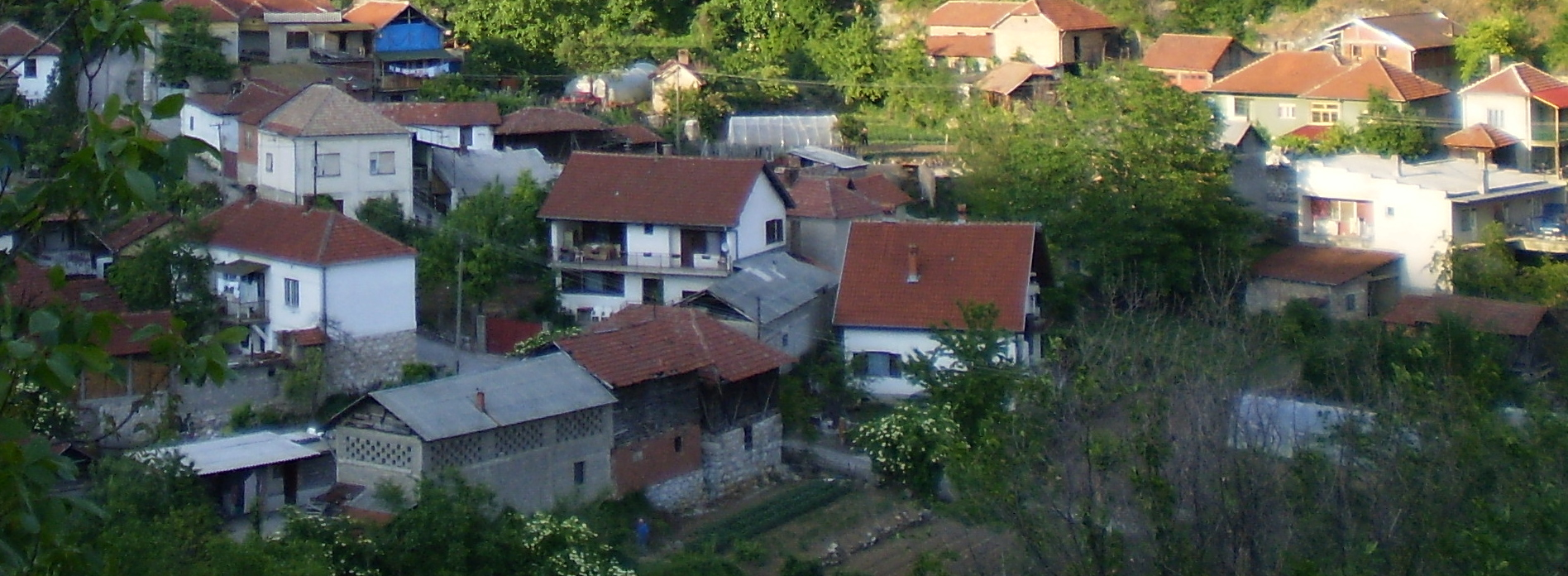 Tipičan izgled naselja u Sićevačkoj klisuri. Autor dr Milorad Dimić, Niš 27. maj 2012.